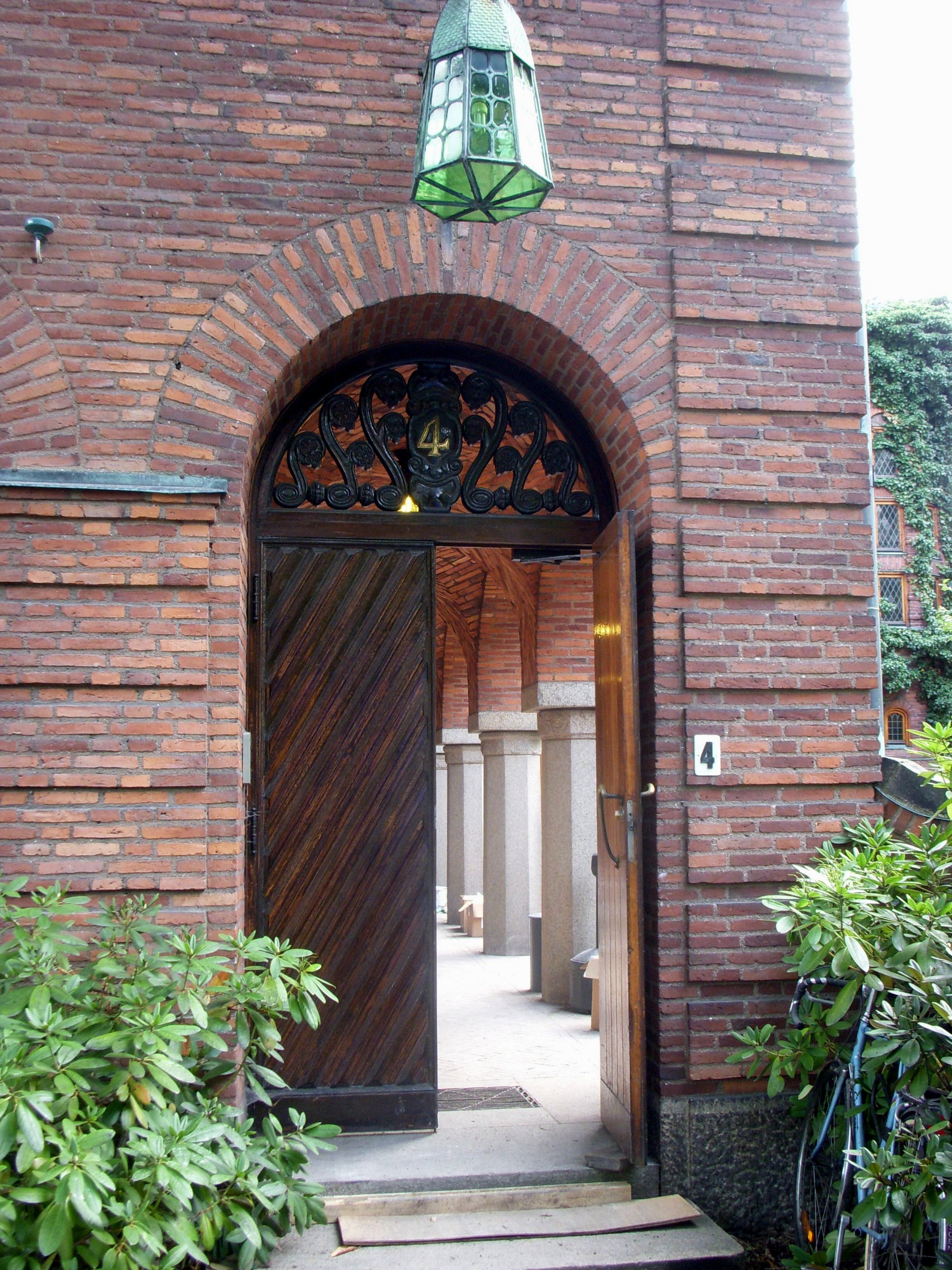 Diplomatstaden i Stockholm, Kv. Diplomaten nr 2, "Tryggerska villan", arkitekt Ivar Tengbom, portdetalj